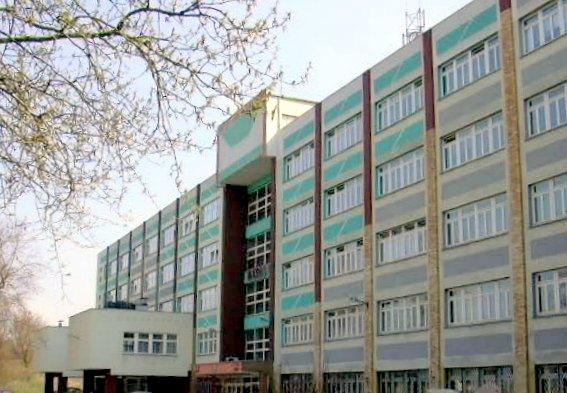 Budynek Wydziału przy ul. Papieża Pawła VI nr 3